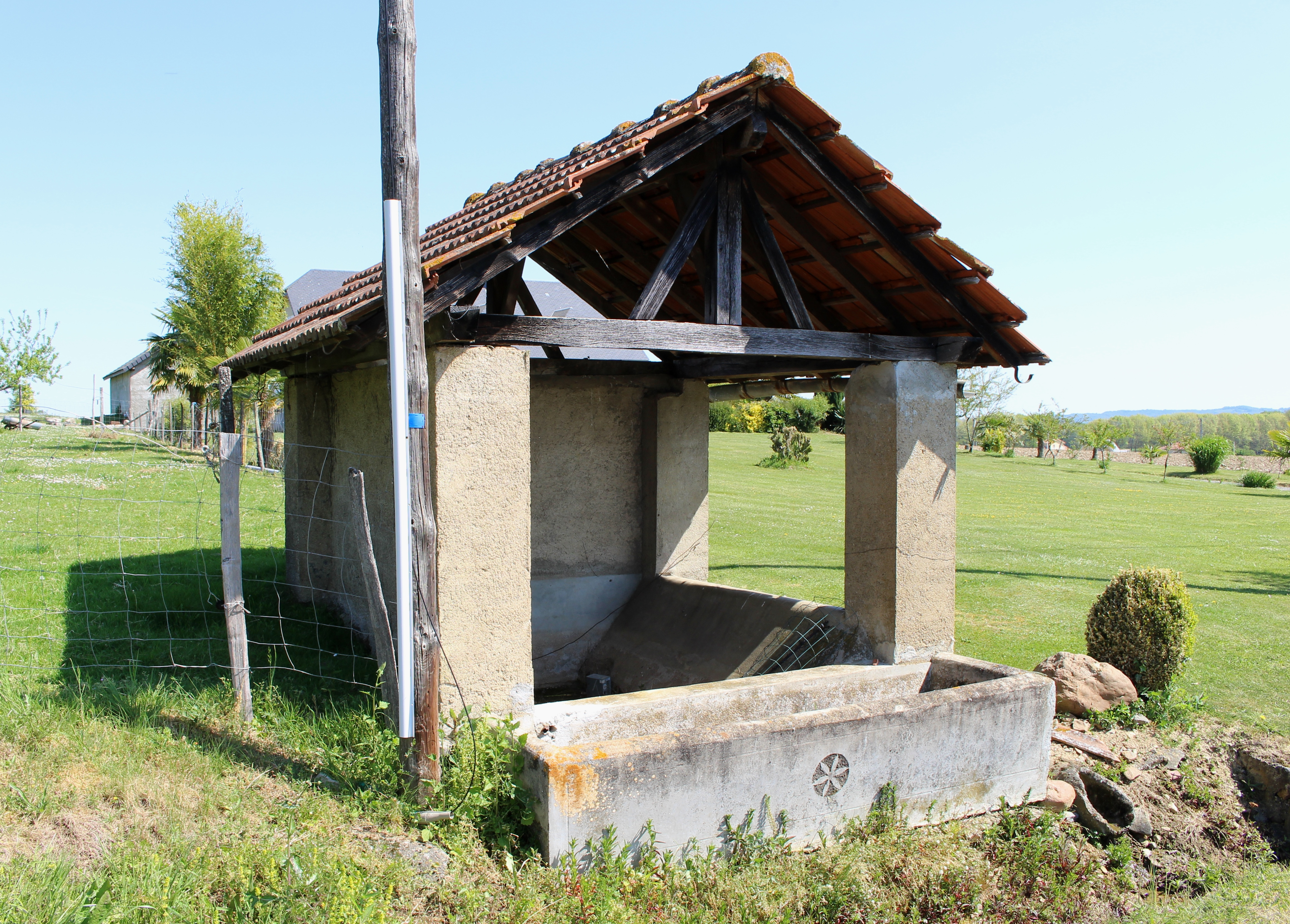 Lavoir de Lansac (Hautes-Pyrénées)